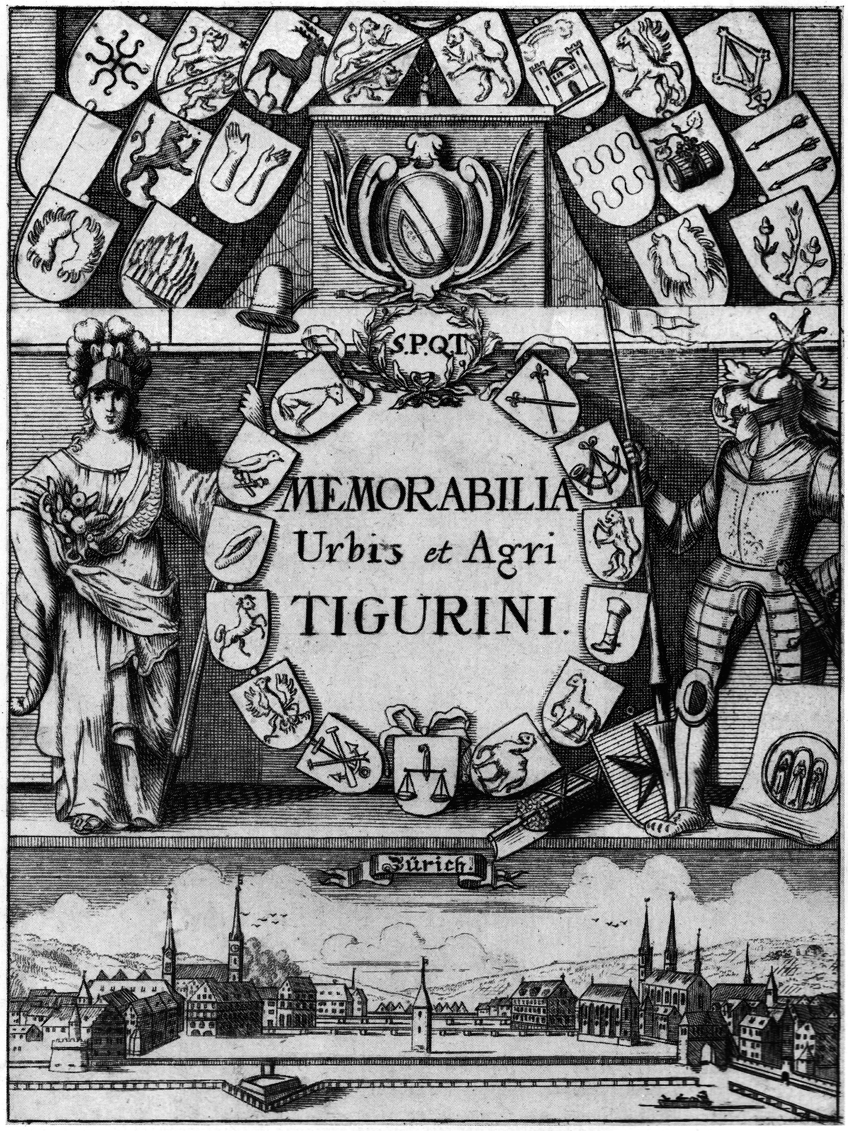 Titelkupfer der 1742 erſchinenen dritten, erweiterten Auflage von Hans Heinrich Bluntſchlis Memorabilibus Tigurinis.